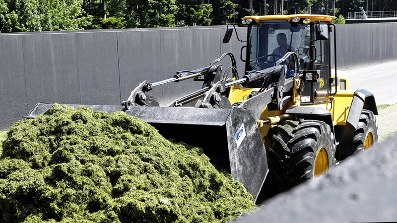 Eine Biogasanlage der ENRW